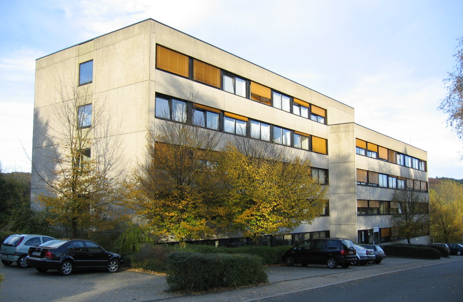 Description: Arbeitsgericht Iserlohn, Erich-Nörrenberg-Straße 7 in Iserlohn Source: selbst fotografiert Date: 27. Okt. 2005 Author: Bubo